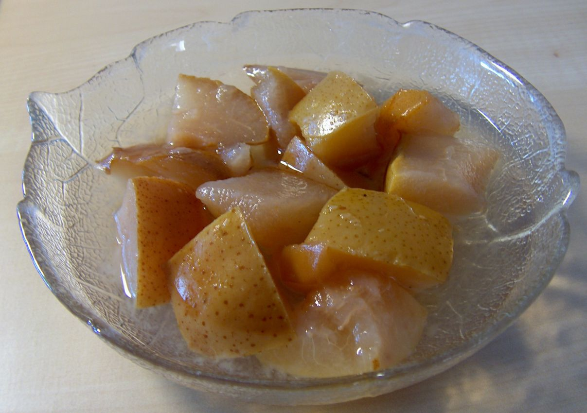 a Schüssele Birnenkompott